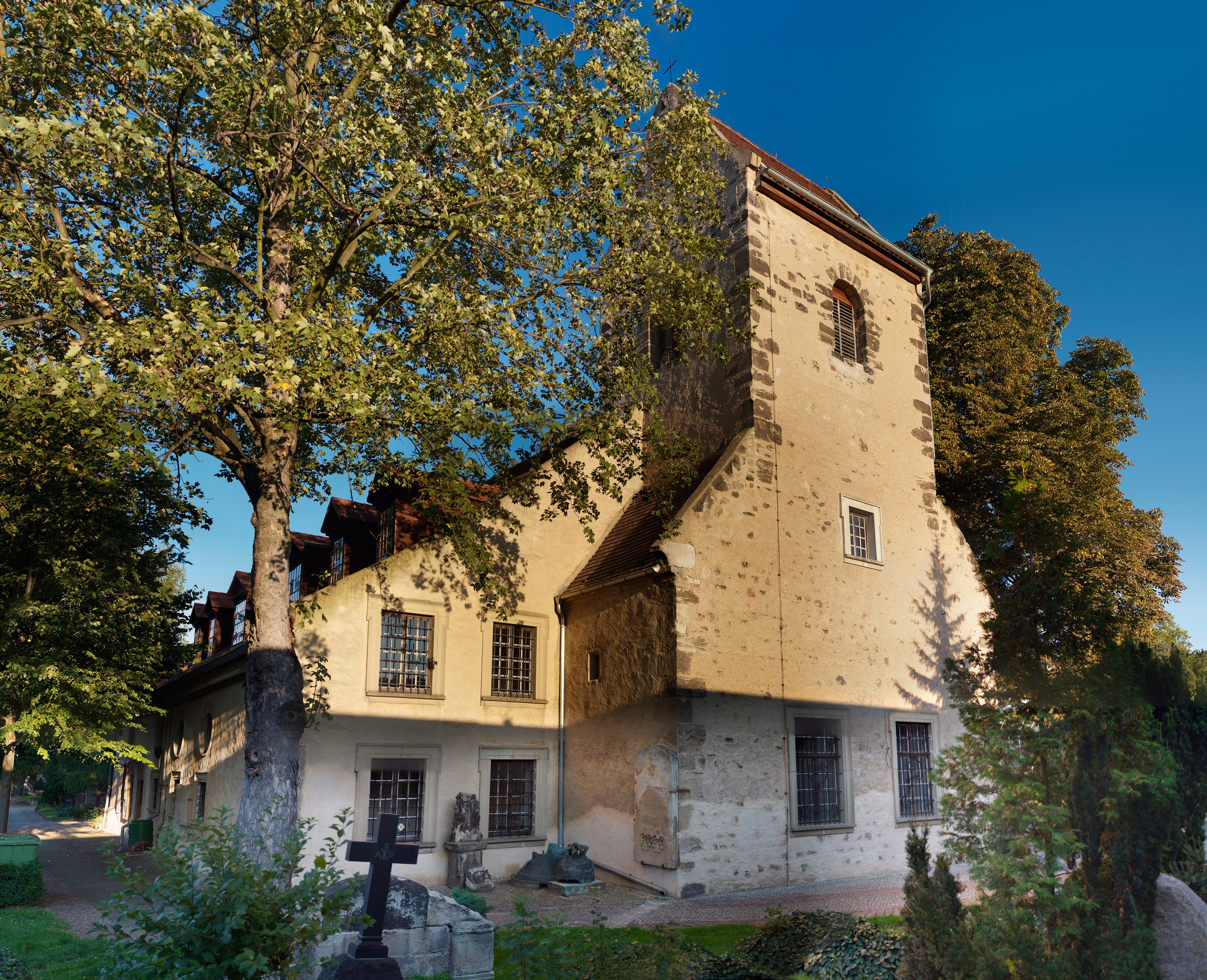 Laurentiuskirche